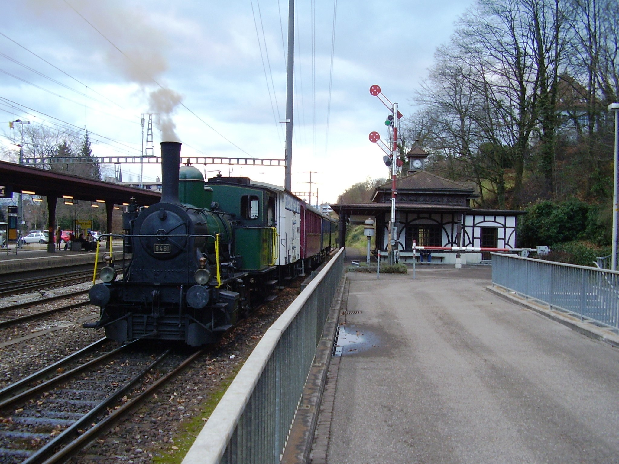 Der Gästezug der Brauerei Feldschlösschen in Rheinfelden beim Gästebahnhof Feldschlösschen neben dem Bahnhof Rheinfelden SBB